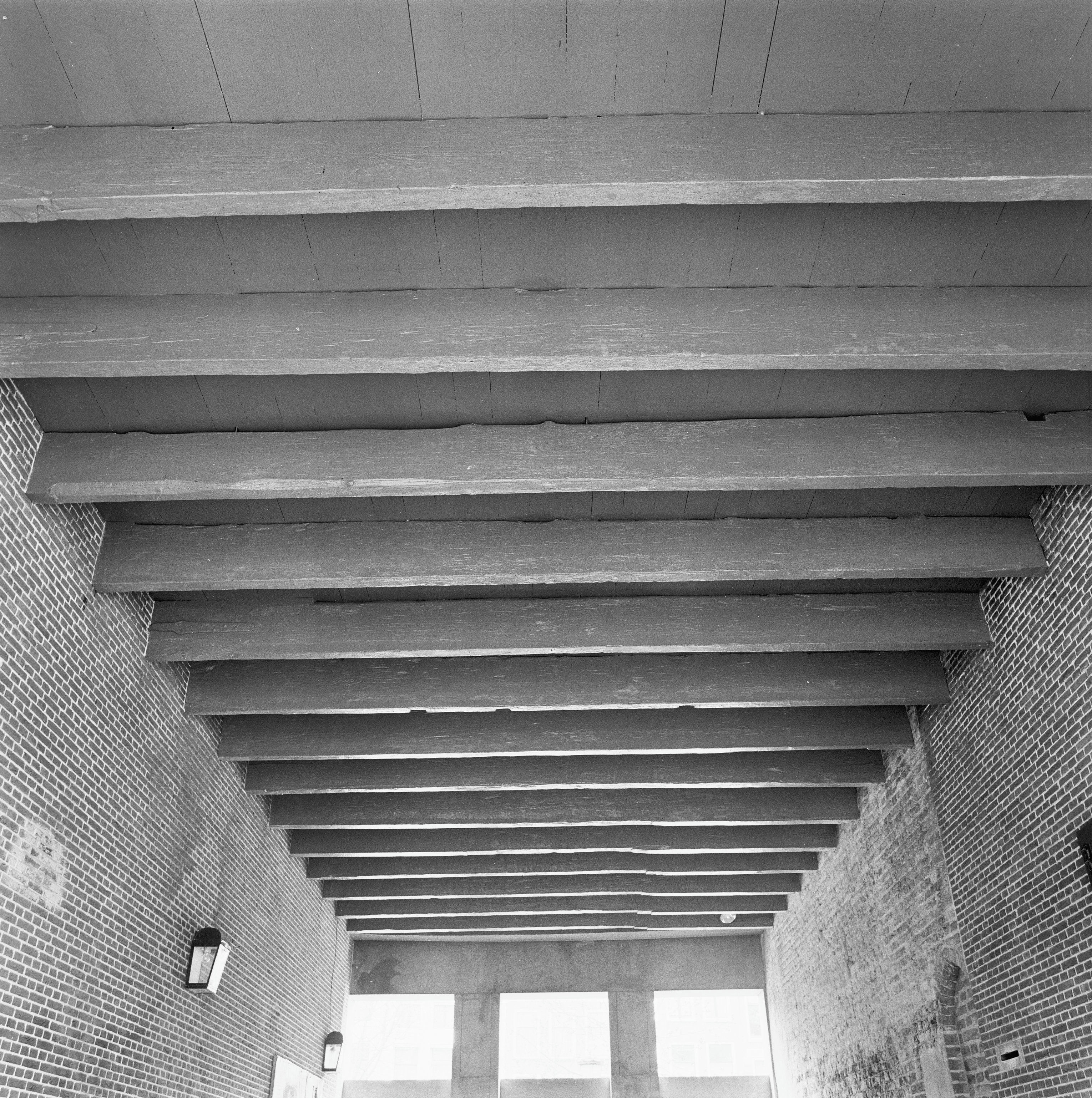 INTERIEUR, BEGANE GROND, KAMER, BALKLAAG